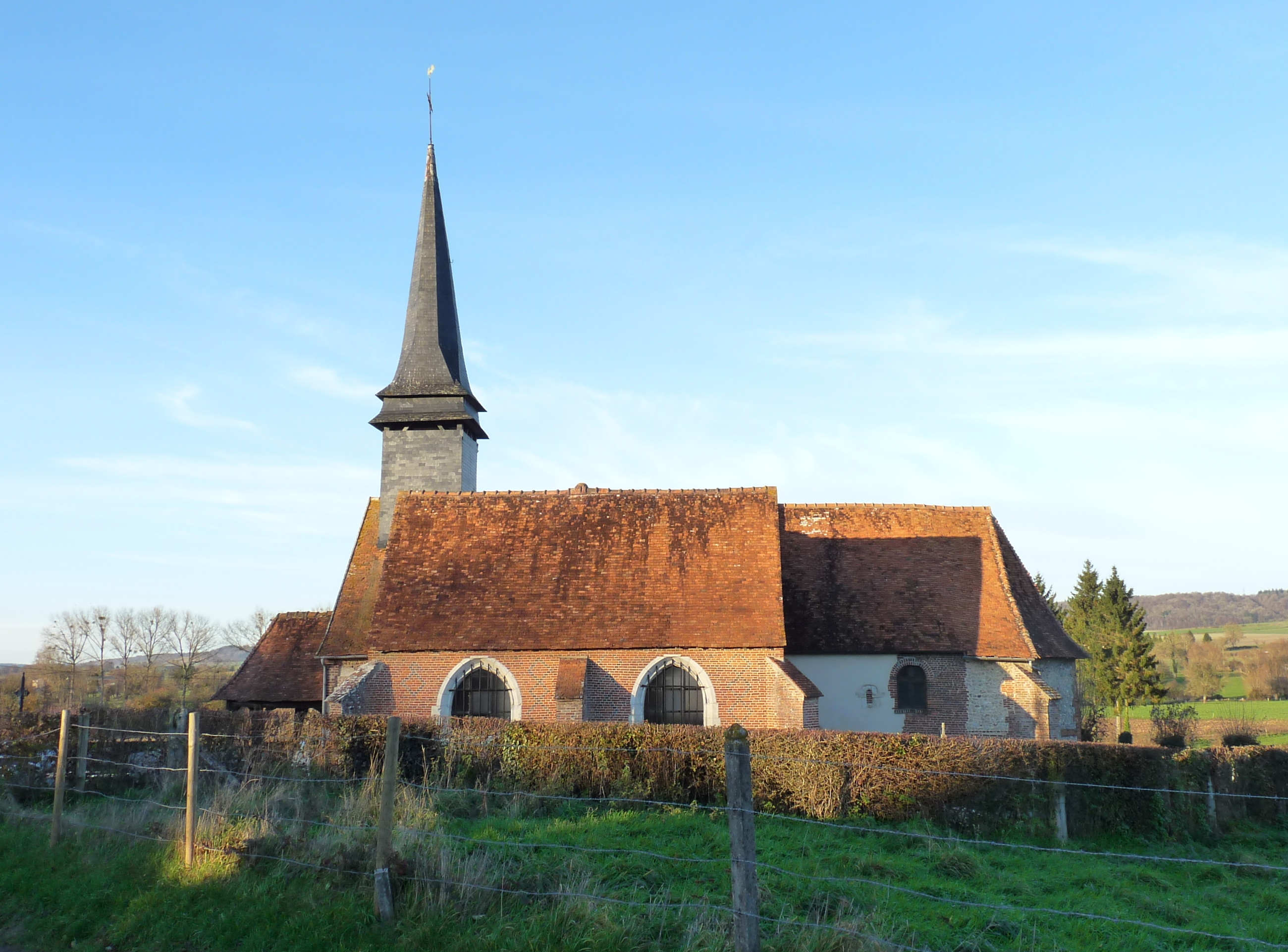 Église Saint-Martin de Saint-Martin-l'Hortier .